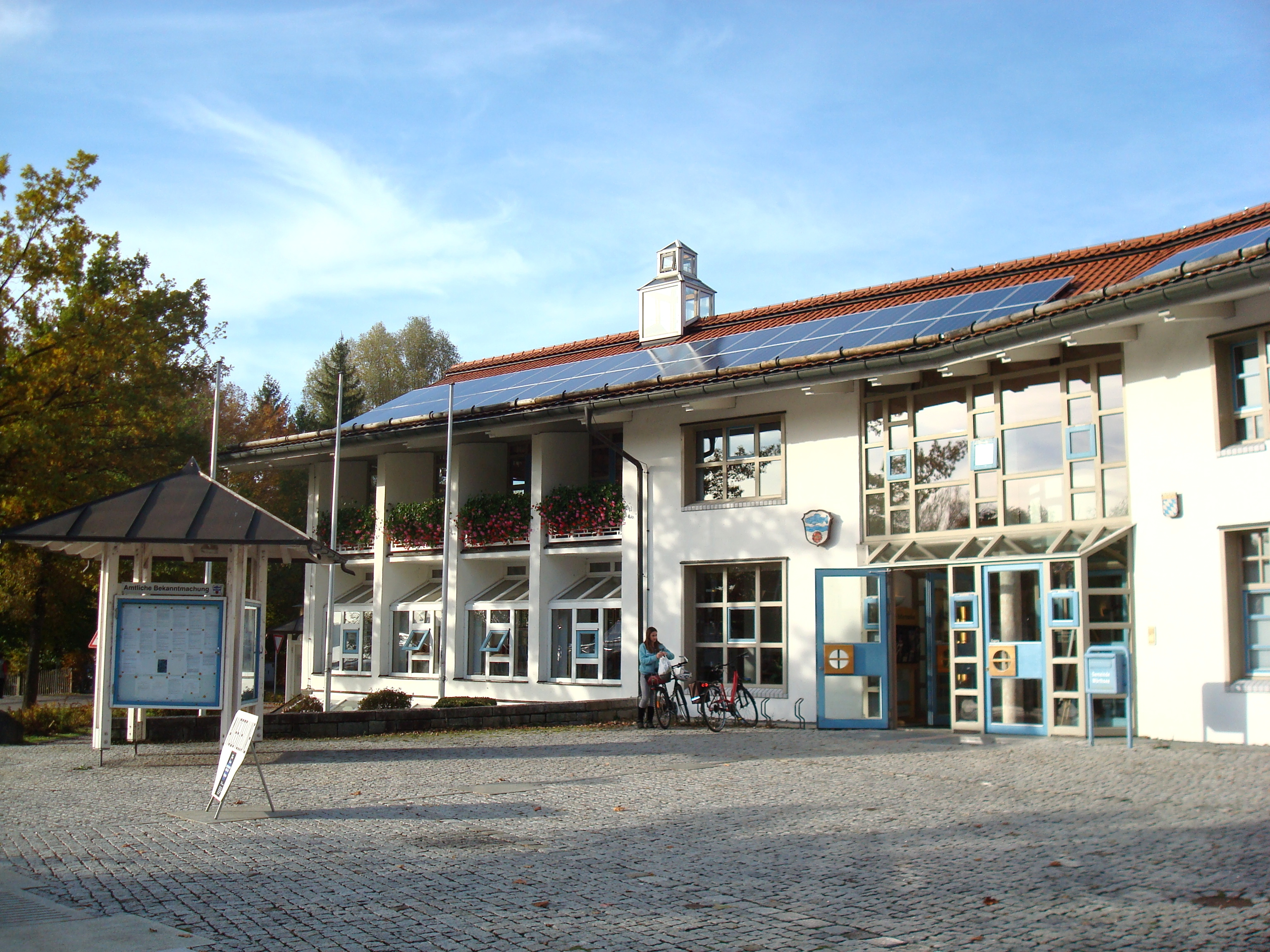 Rathaus der Gemeinde Wörthsee